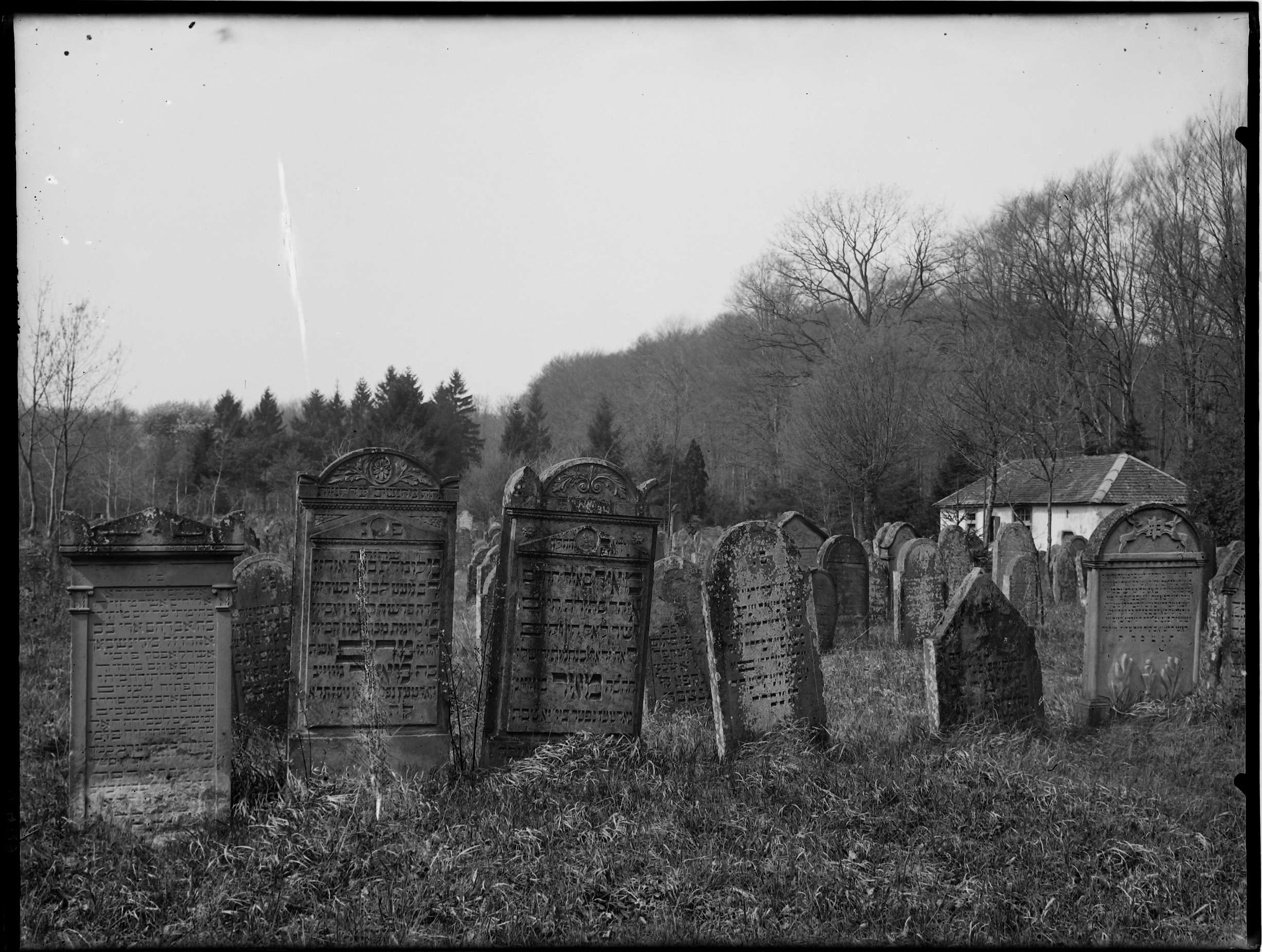 Grabsteine auf dem jüdischen Friedhof Obergrombach (heute Stadtteil von Bruchsal)